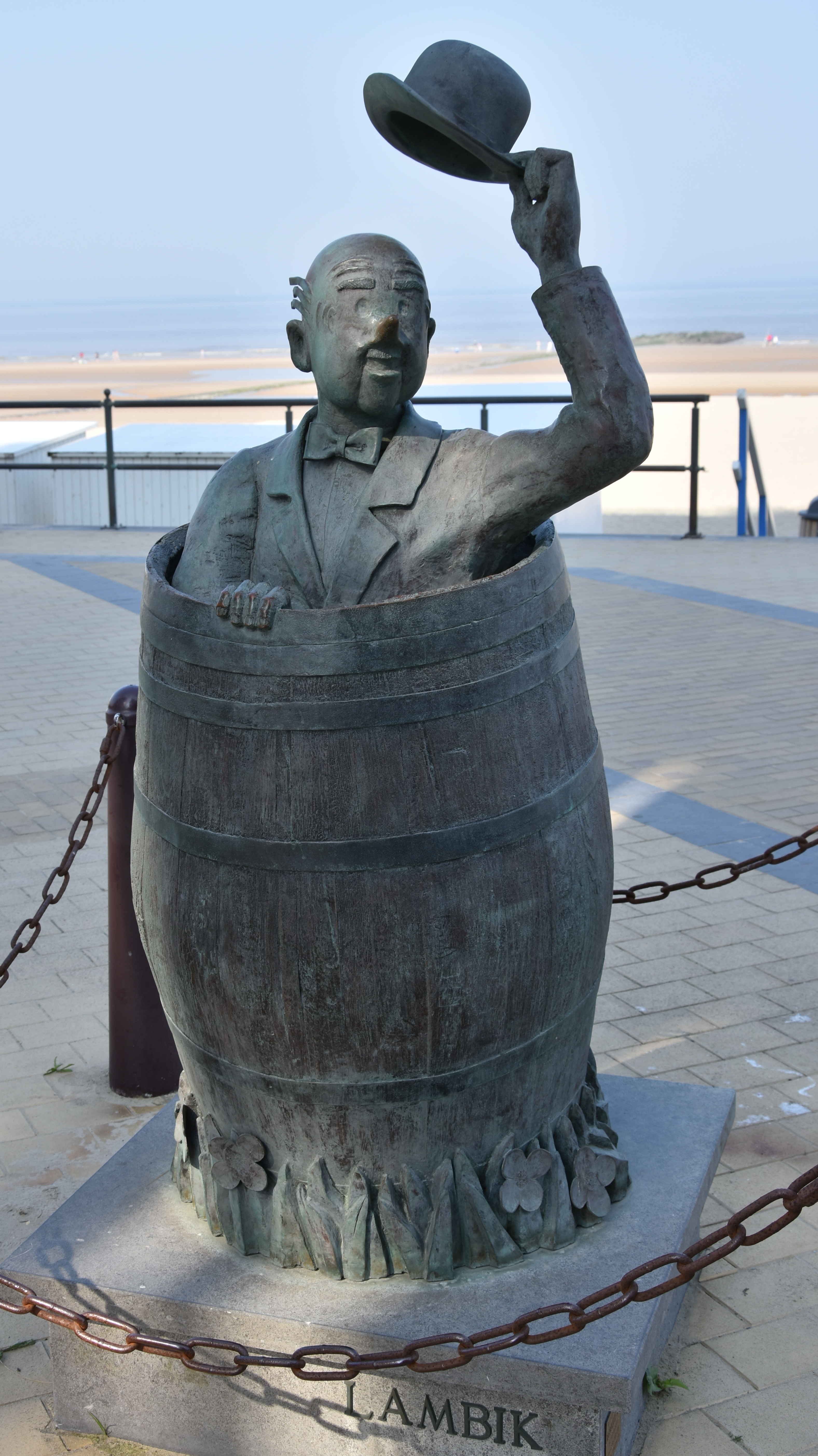 Jan Maillard - Nero - Stripstandbeelden Middelkerke